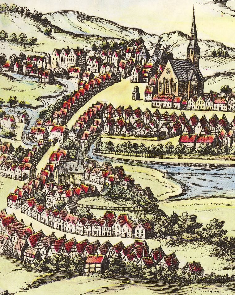 Angelboport, Mølleport og Friserport i det gamle Flensborg